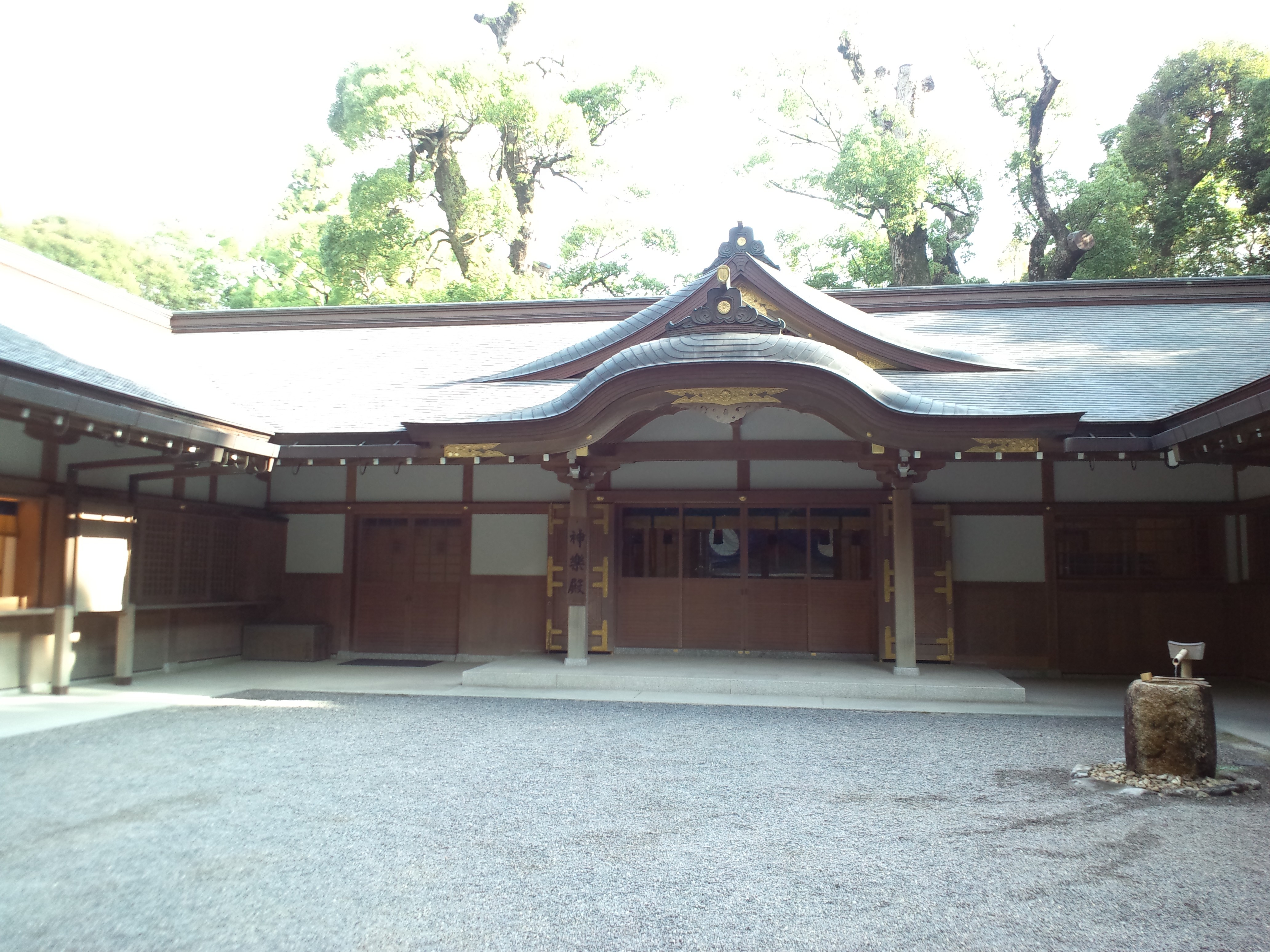 伊勢神宮 外宮 神楽殿